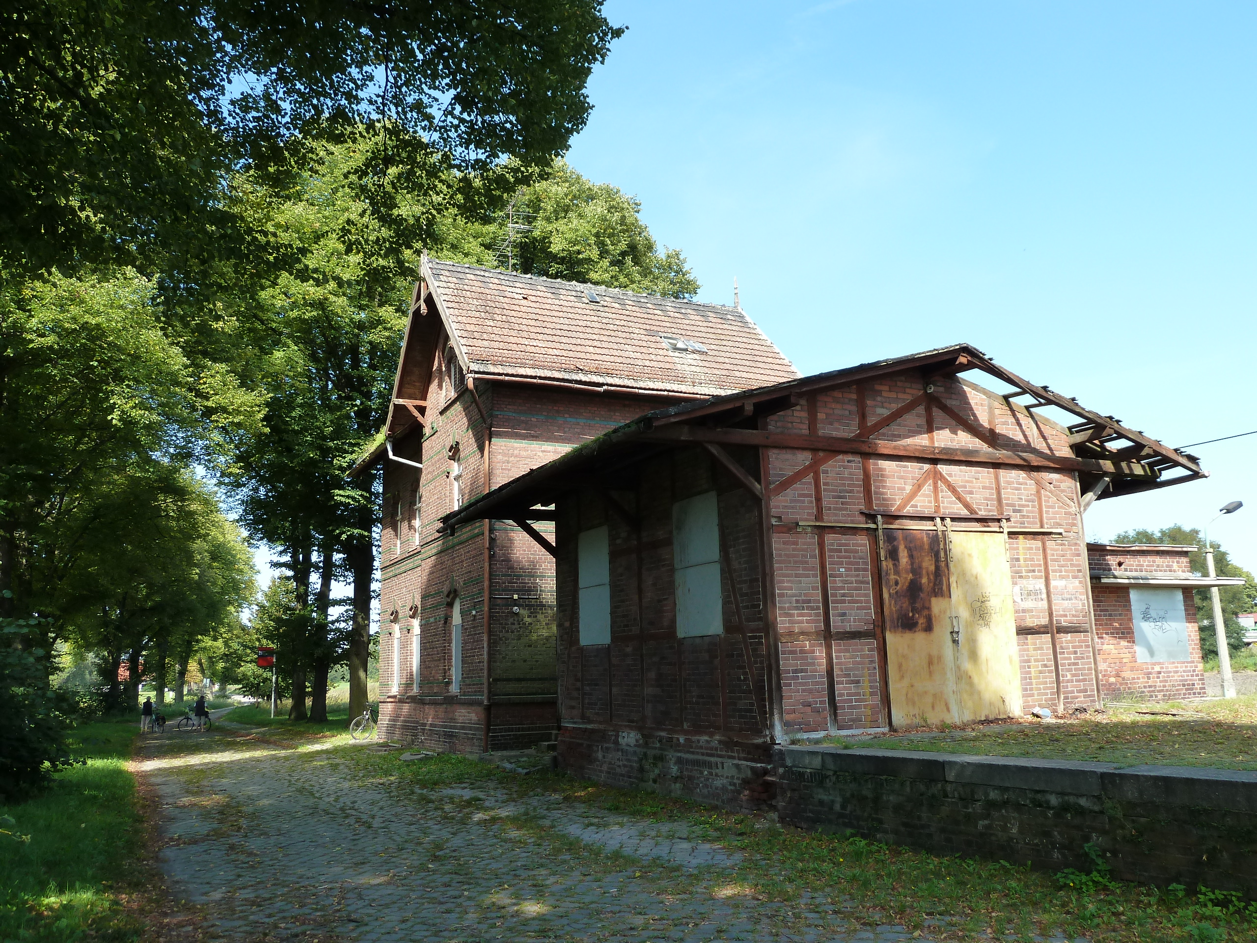 Bahnhof Buckow bei Beeskow, denkmalgeschütztes Empfangsgebäude